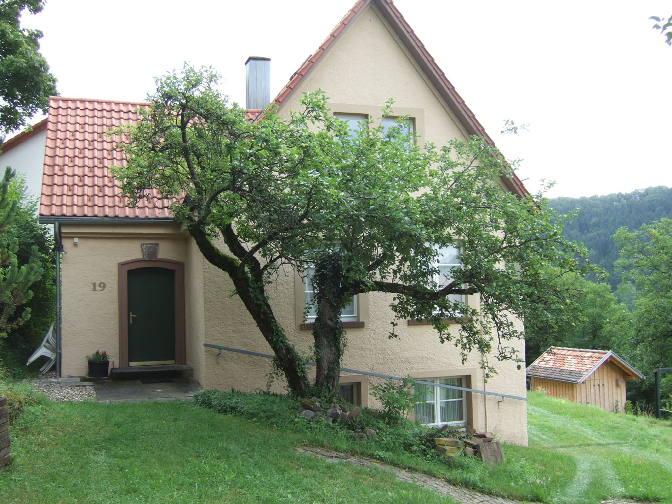 Atelier der Kunststiftung Paul Kälberer, Glatt (Sulz am Neckar) Verwendung mit Erlaubnis des Urhebers